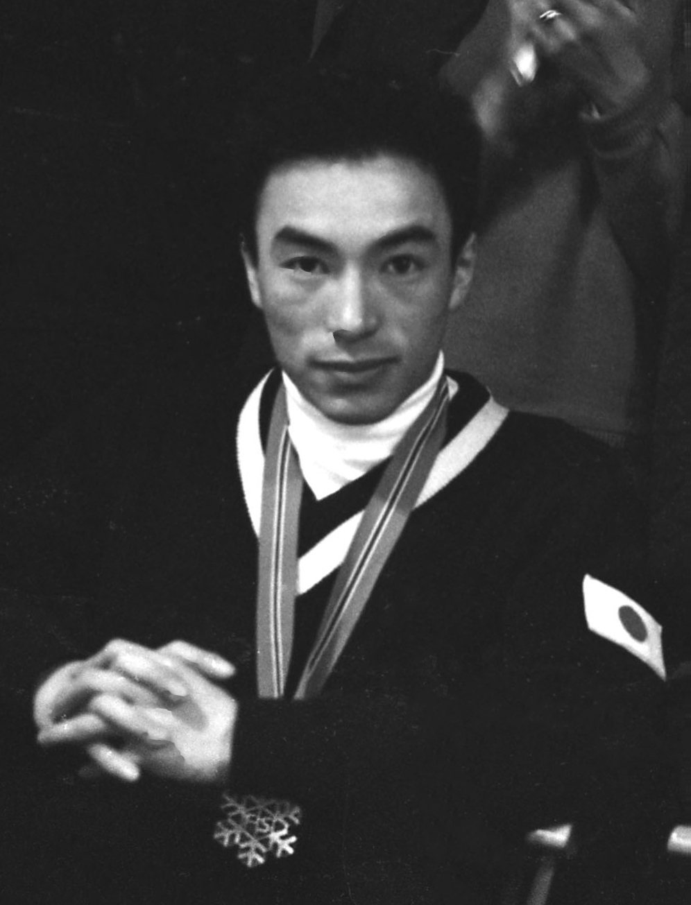 Beskrivelse: Bjørn Wirkola tok gull, japaneren Takashi Tutisawa tok sølv og Kjell Sjöberg bronse i hopp, stor bakke, Holmenkollen, verdensmesterskapet i Oslo 1966 Fotograf: Billedbladet NÅ/van Deurs Sted: Oslo År: 1966 Arkivreferanse: RIKSARKIVET- RA/PA/0797/U/Ua/3908_8_019